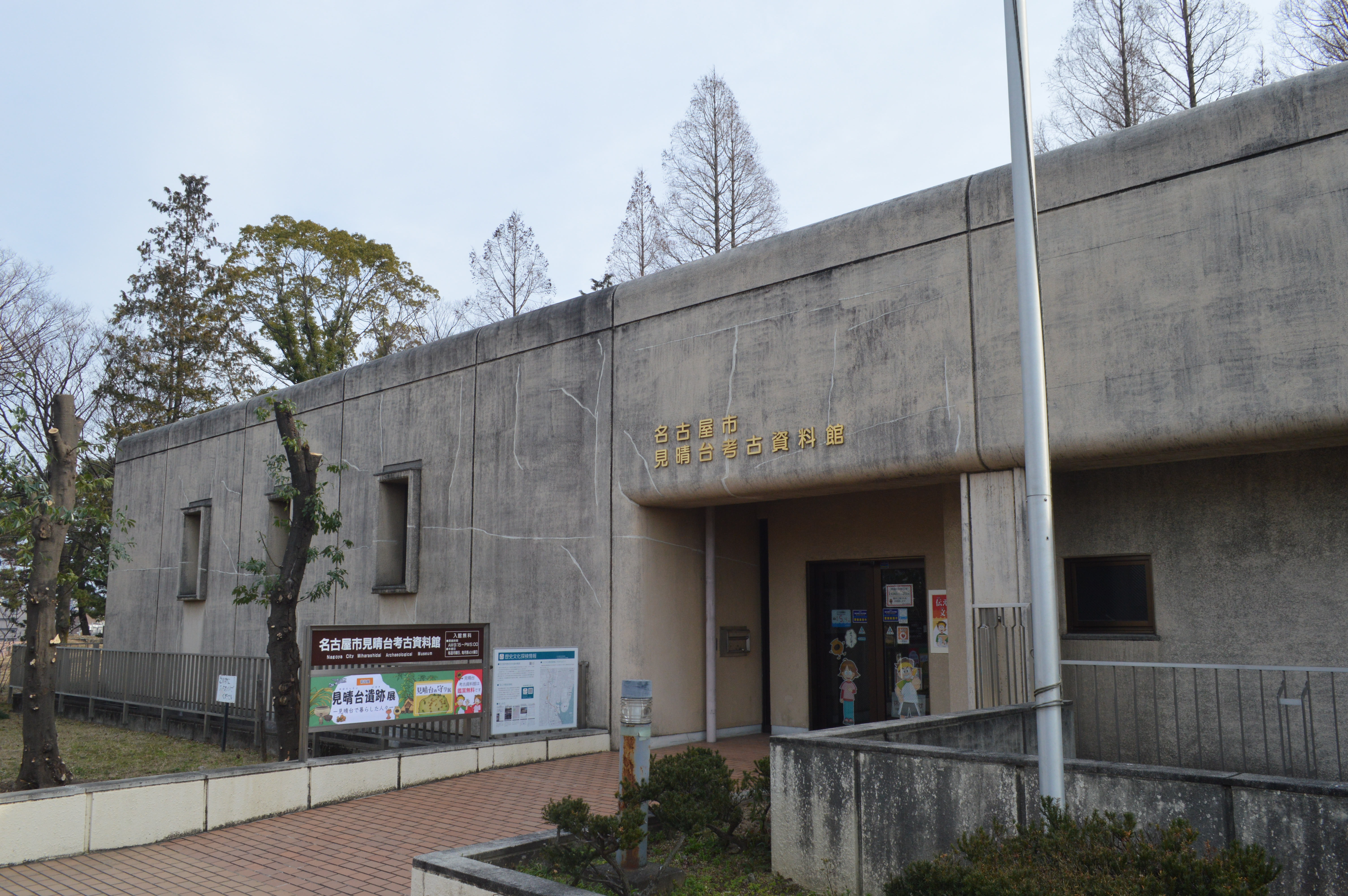 愛知県名古屋市南区にある名古屋市見晴台考古資料館。